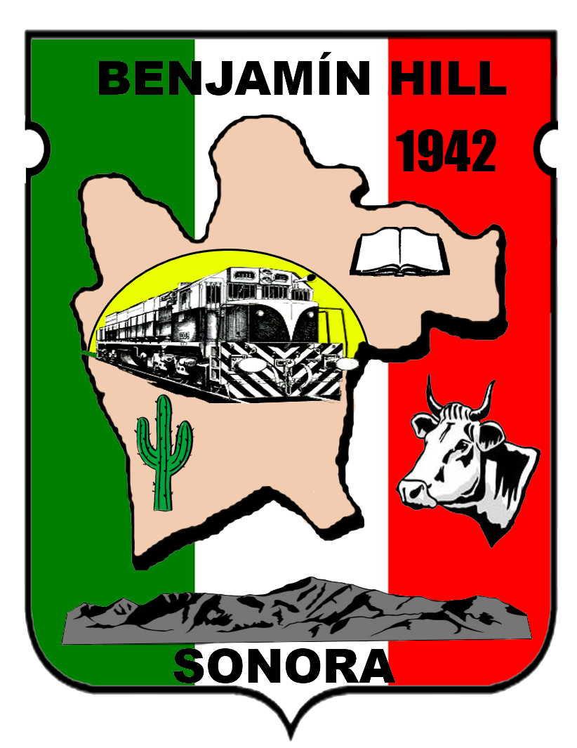 Escudo del municipio sonorense.